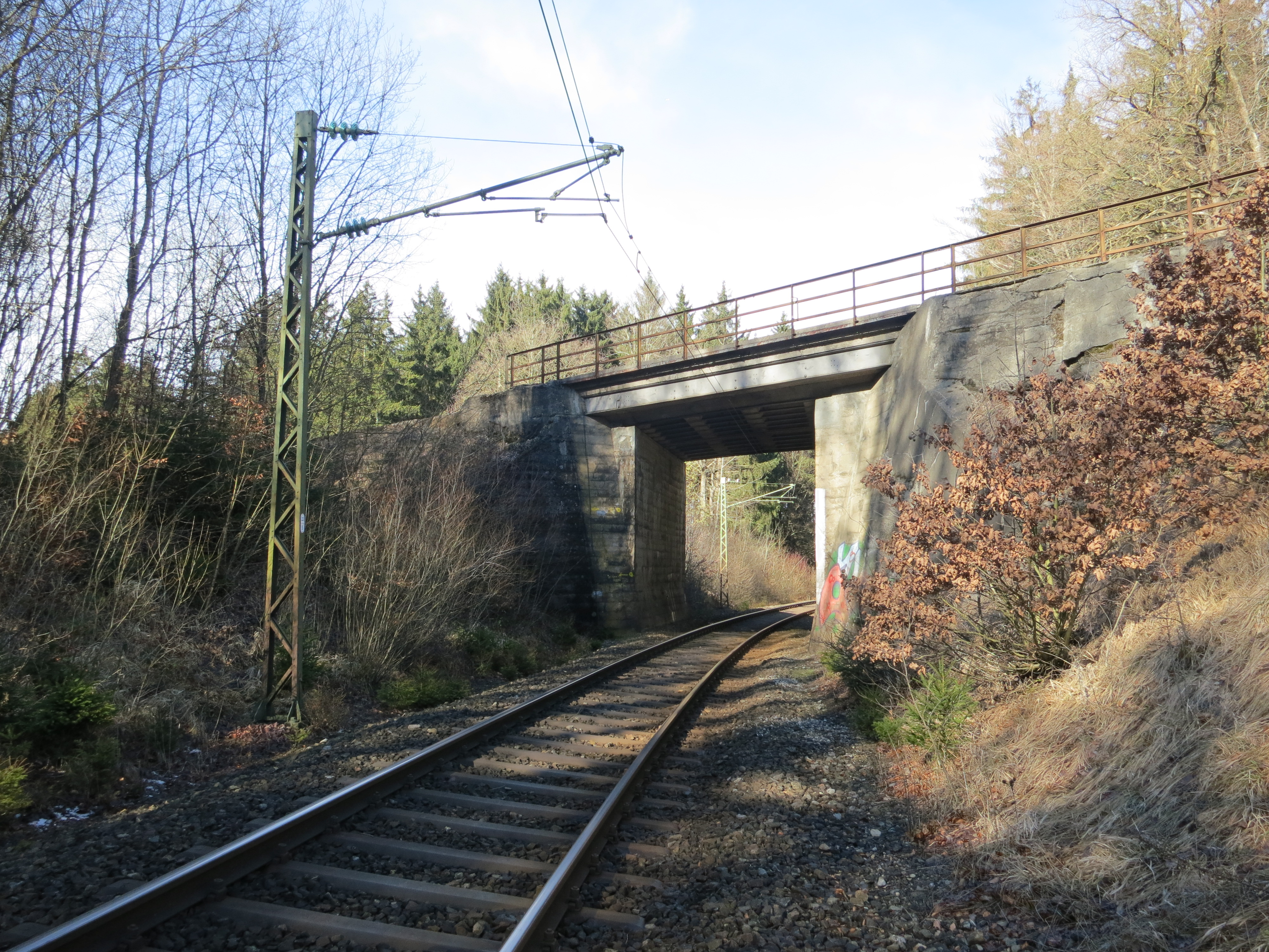 1907 errichtetes Kreuzungsbauwerk der Ammerseebahn und der Allgäubahn westlich des Bahnhofs Geltendorf, Ammerseebahngleis im Vordergrund